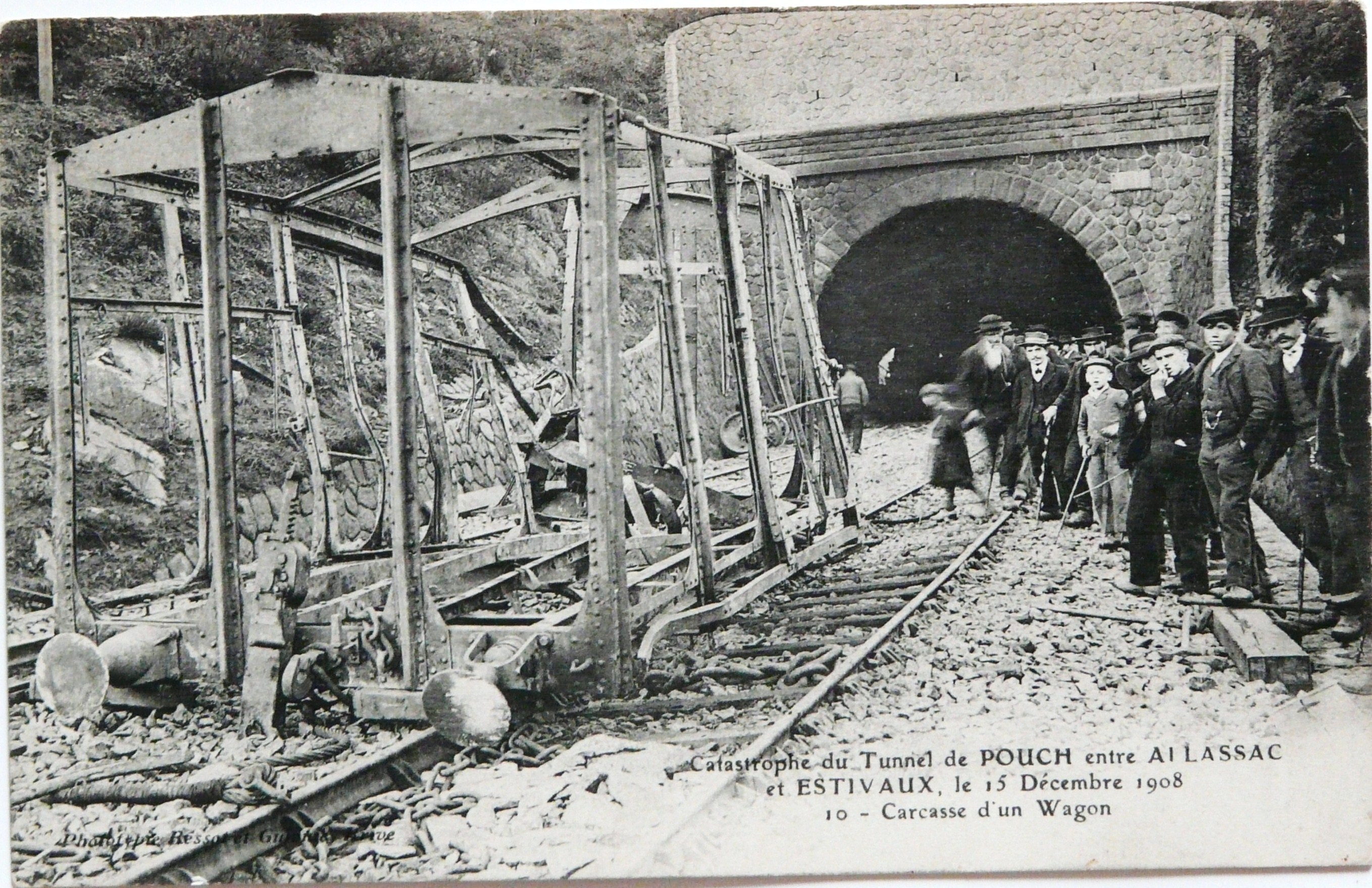 Catastrophe du tunnel de Pouch du 15 décembre 1908 (carcasse d'un wagon).